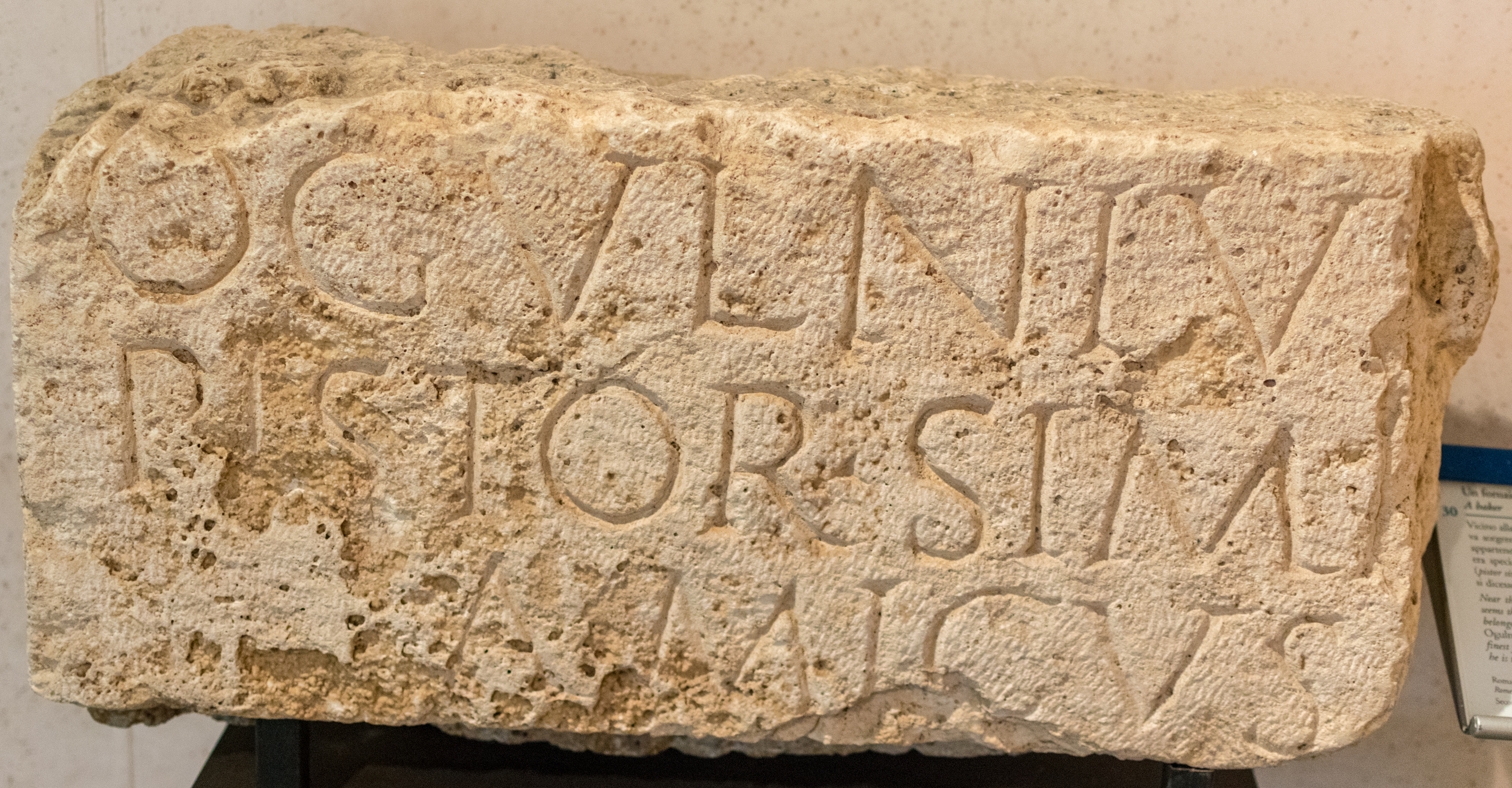 Grabinschrift des Bäckers Ogulnius aus der zweiten Hälfte des 1. Jahrhunderts v. Chr., das in unmittelbarer Nähe beim Grabmal des Eurysaces in Rom gefunden wurde